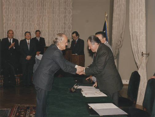 Edgardo Boeninger, asumiendo como ministro Secretario General de la República de Chile.